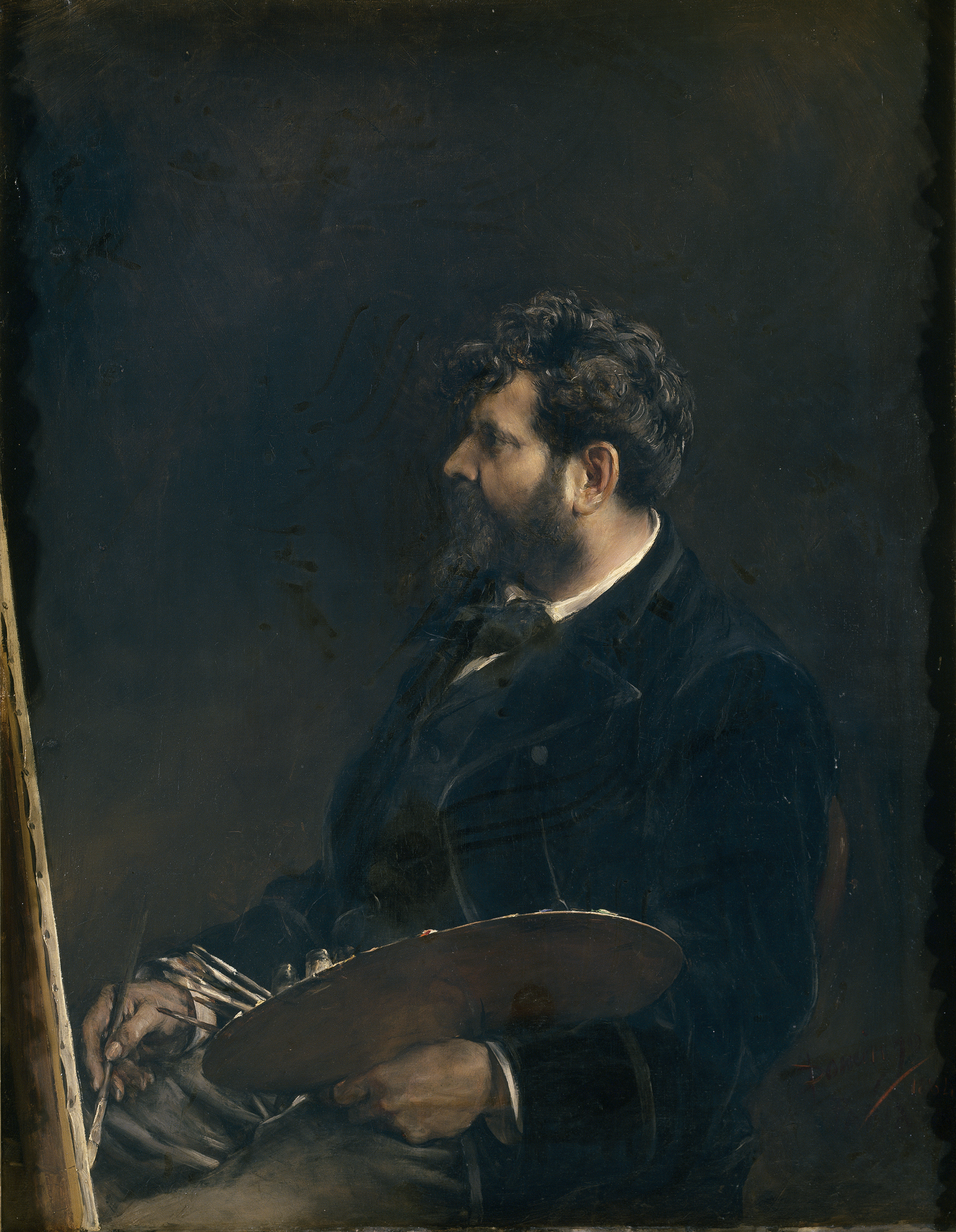 Autorretato del pintor español Francisco Domingo Marqués (1842-1920)